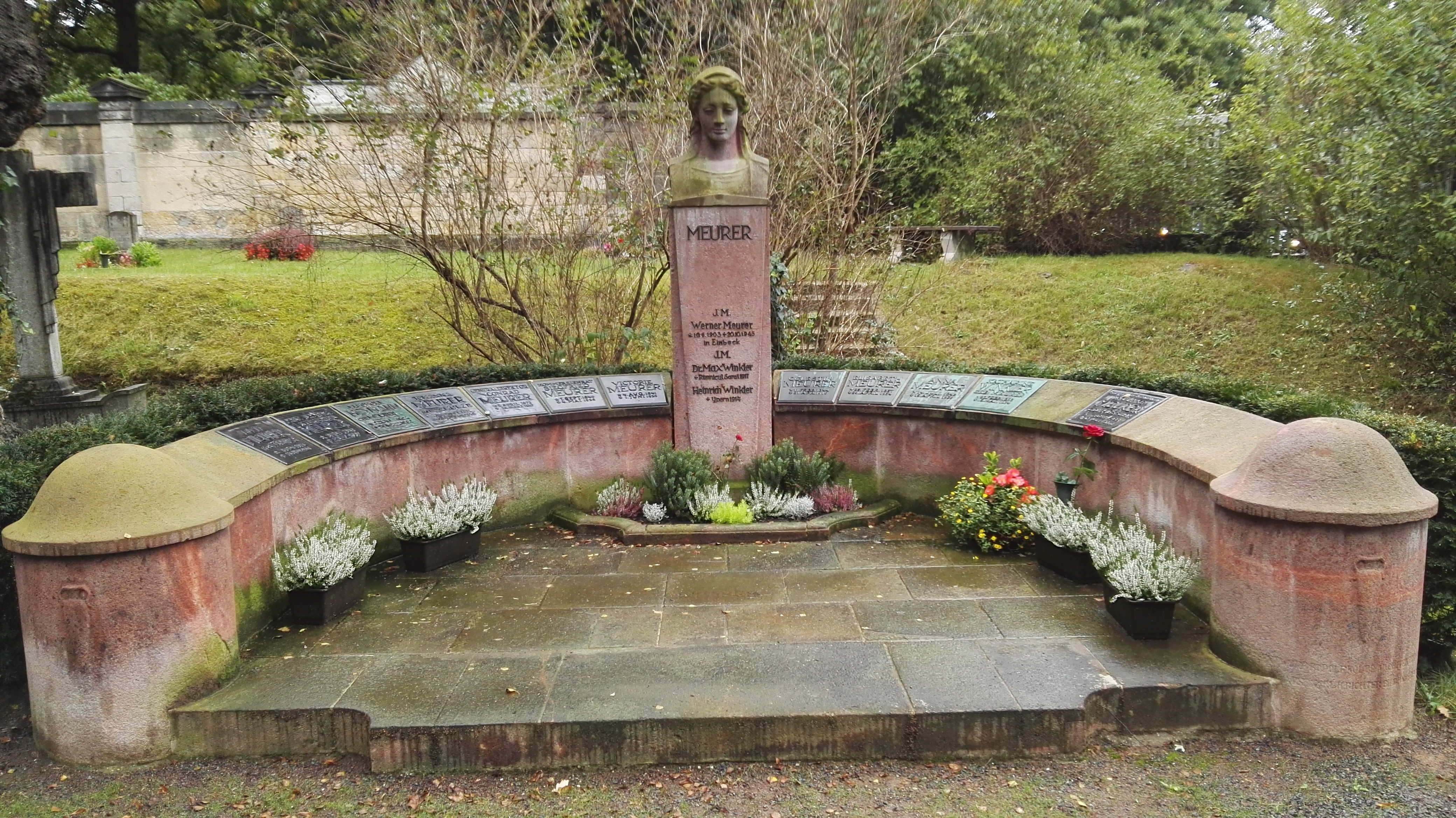 Grab der Familie Meurer auf dem Urnenhain Tolkewitz; rechts die Grabplatte für Ulrike Hessler-Meurer